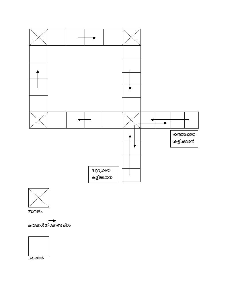 തായം കളിയുടെ കളത്തിന്റെ മാതൃക.